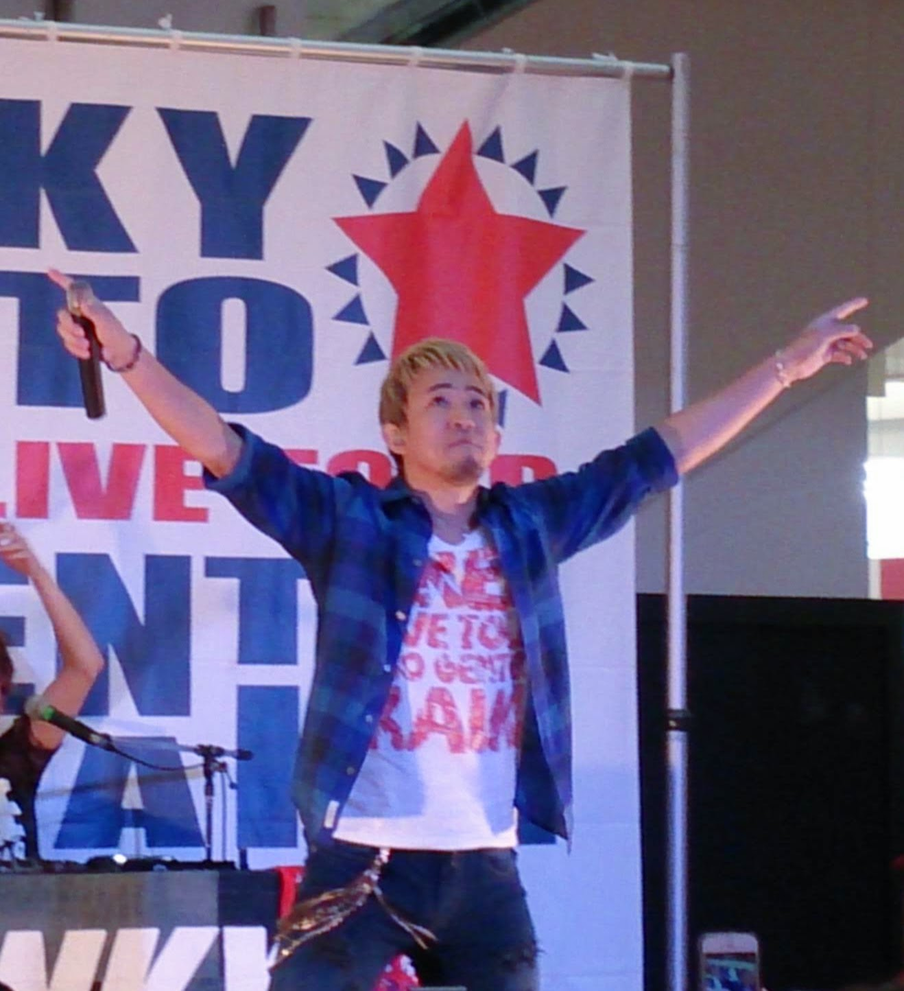 加藤 俊介（新潟県長岡市・リバーサイド千秋にて）